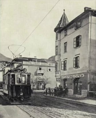 Oltreisarco, tram per Laives